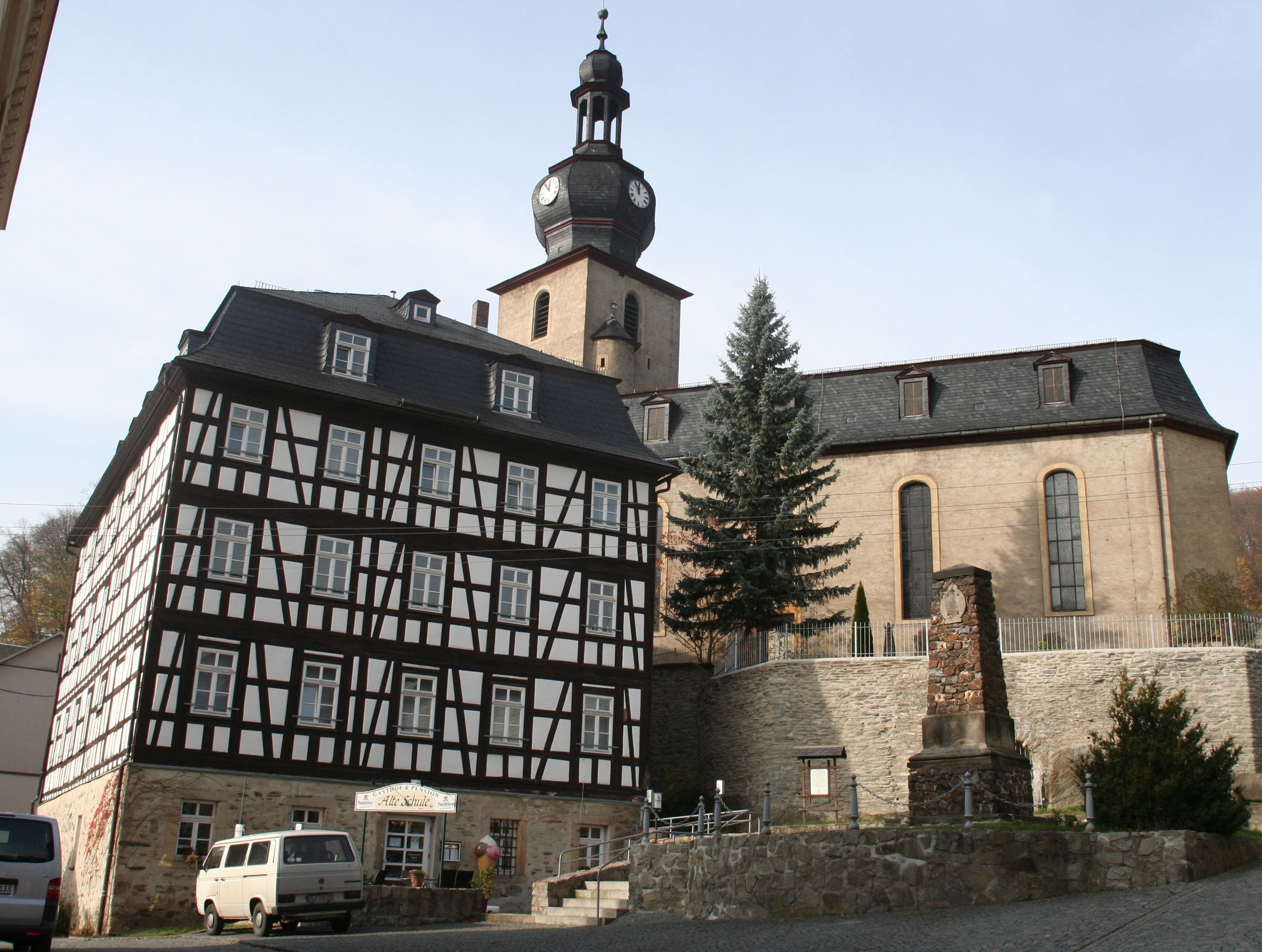 ev. Stadtkirche St. Marien und die alte Schule in Gräfenthal in Südthüringen